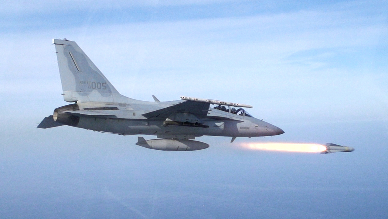 공군은 10월 8일(수), 동해상에서 국산전투기 FA-50의 공대지 무장 실사격을 최초로 실시해 성공했다. 사진은 FA-50 전투기에서 공대지 미사일인 AGM-65G(매버릭)가 발사되는 장면